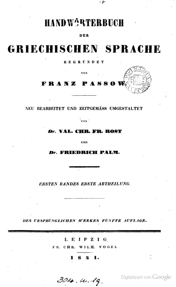 Handwörterbuch der griechischen Sprache by Passow, Val. Chr. Fr. Rost and Friedrich Palm